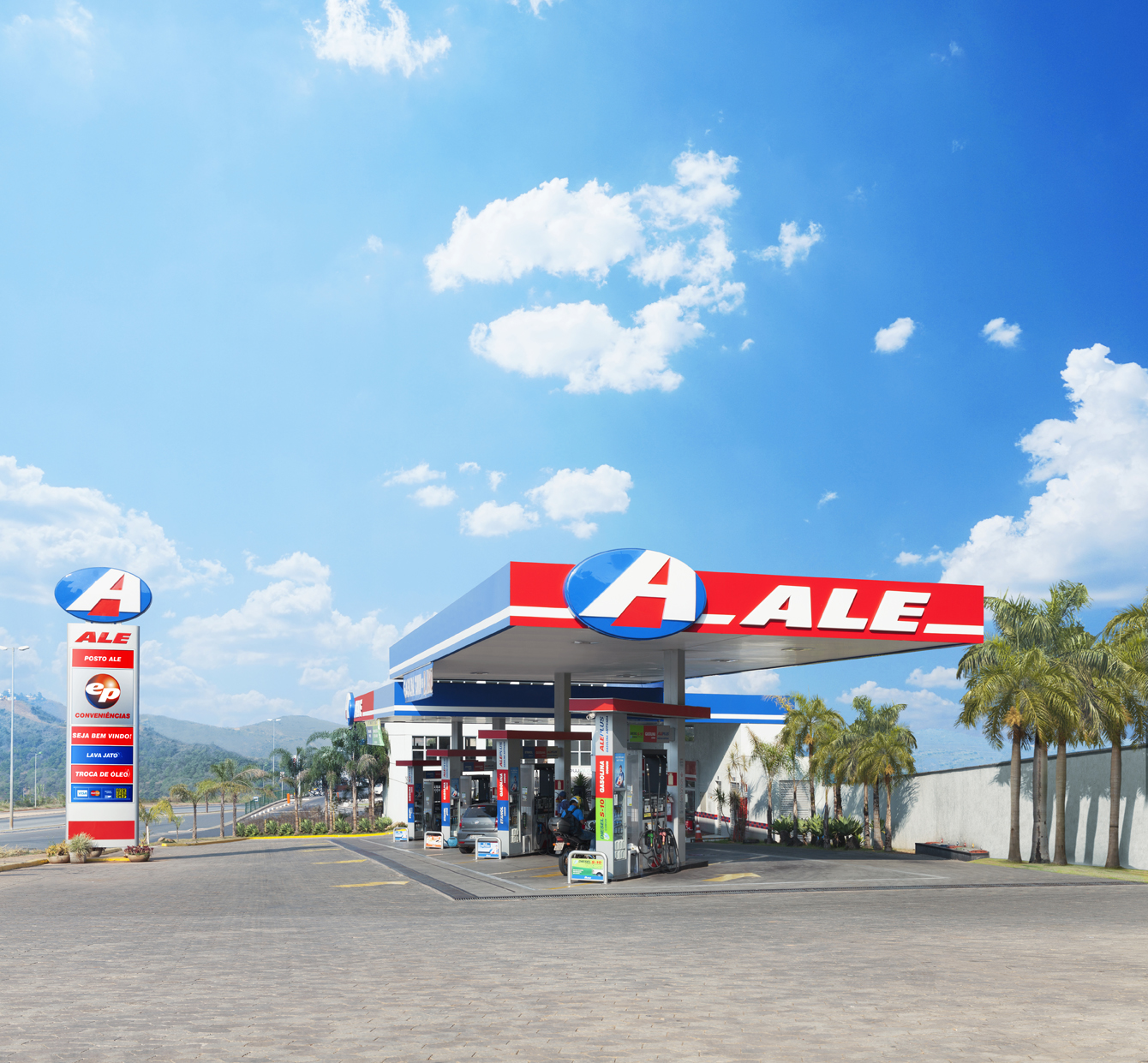 Posto ALE Serena Mall, em Nova Lima (MG)